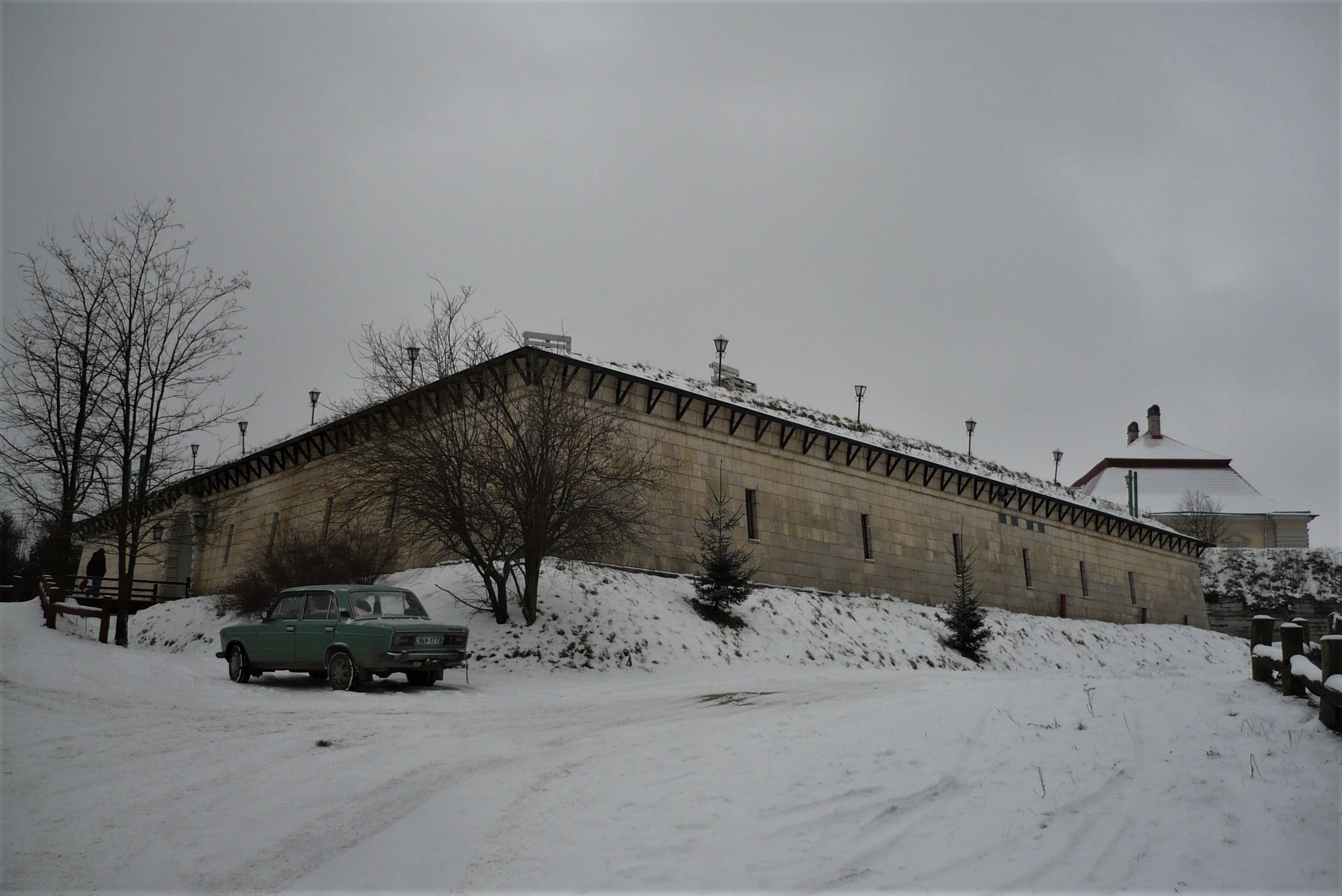 Zamek